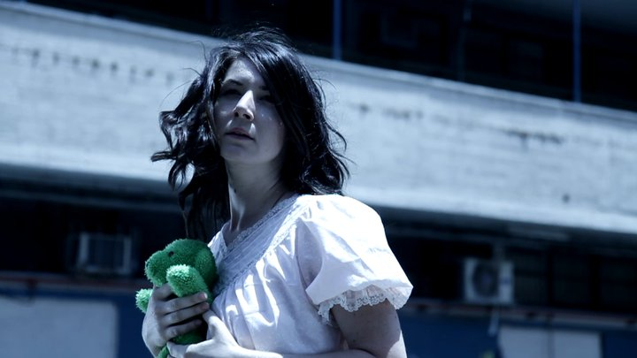 נועה בירון בקליפ מהג'ירפות